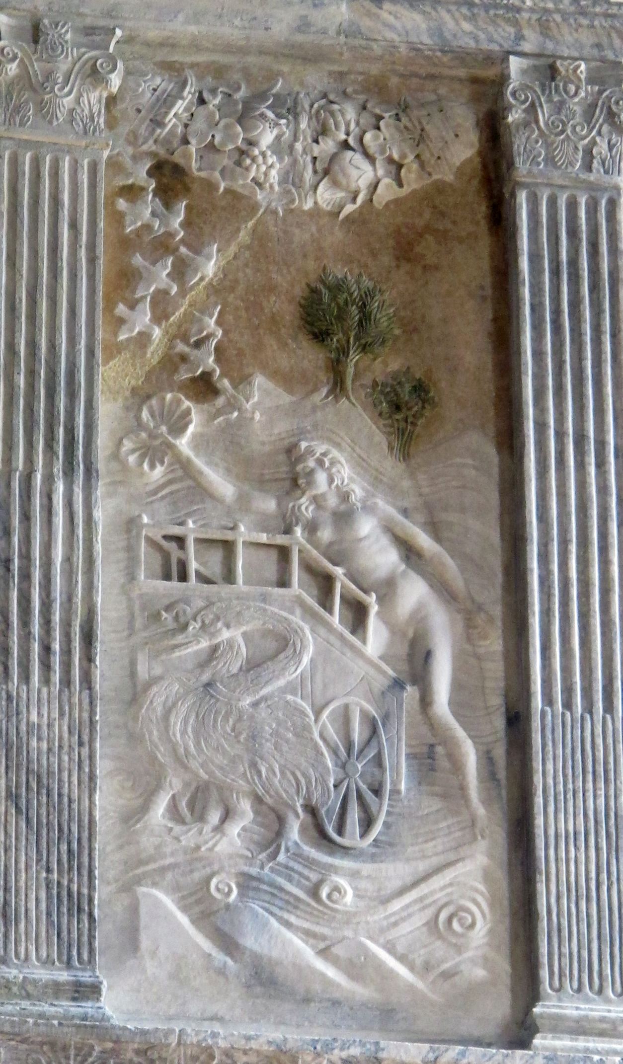 Tempio Malatestiano - MIBAC This is a photo of a monument which is part of cultural heritage of Italy.